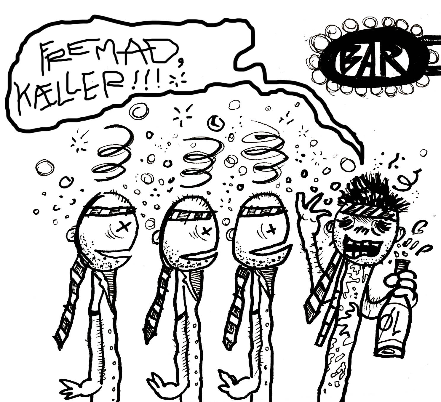 Ilustrasjonen fremstiller fire menn i ferd med å iverksette sitt "nachpiel", altså fest etter festen.